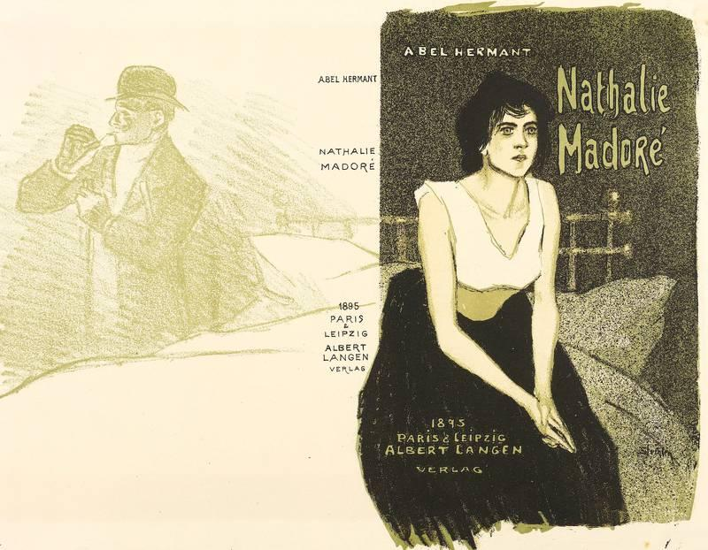 Einbandentwurf für Abel Hermant: Nathalie Madoré, Paris & Leipzig: Albert Langen Verlag, 1895. Farblithographie / Kreidelithographie, in drei Farben